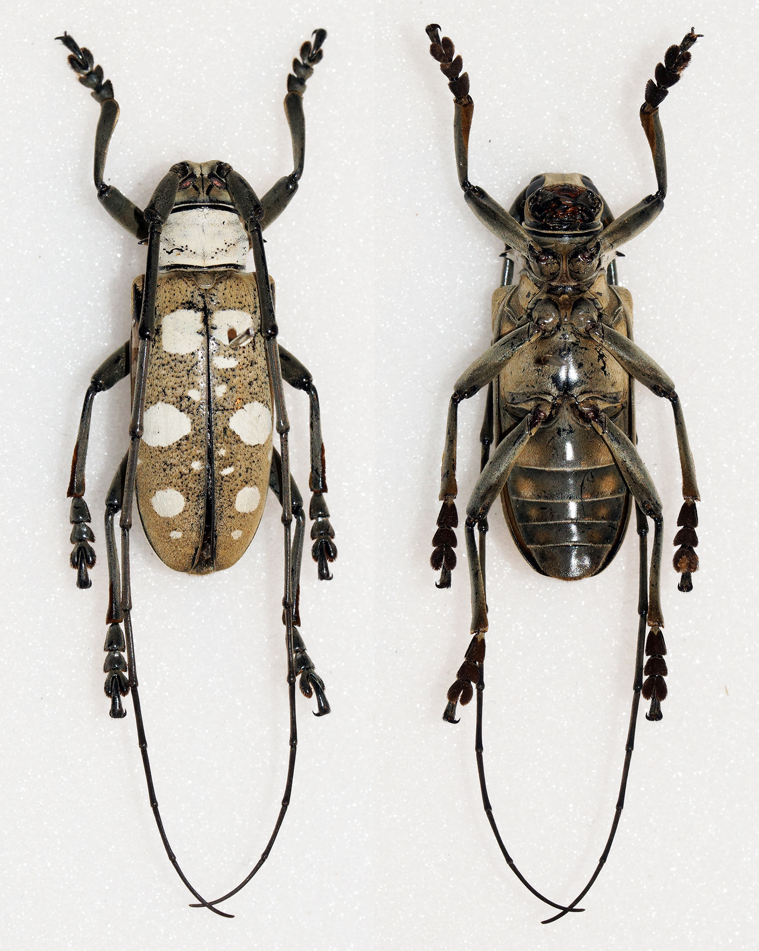 Pascoe,1866 Sex: Male Data: 03-2011 - Halmahera - Indonesia Size: 31mm